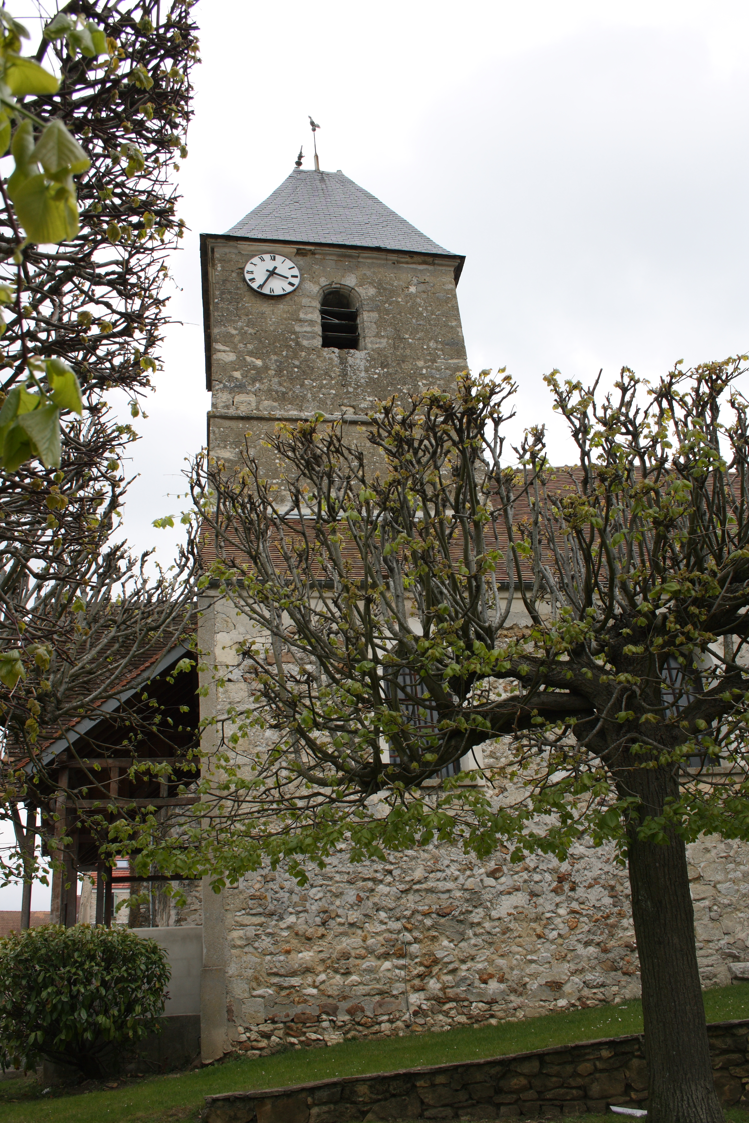 Kirche Saint-Denis in Drocourt (Yvelines)